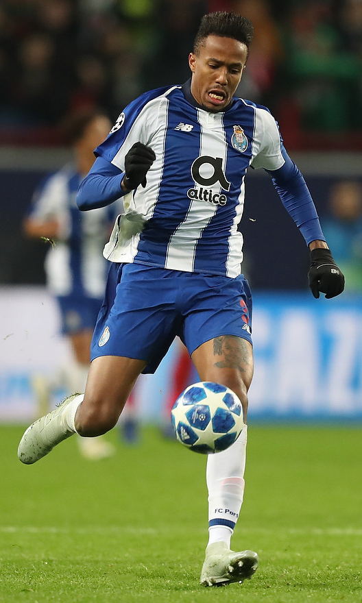 «Локомотив» терпит очередное поражение в Лиге чемпионов